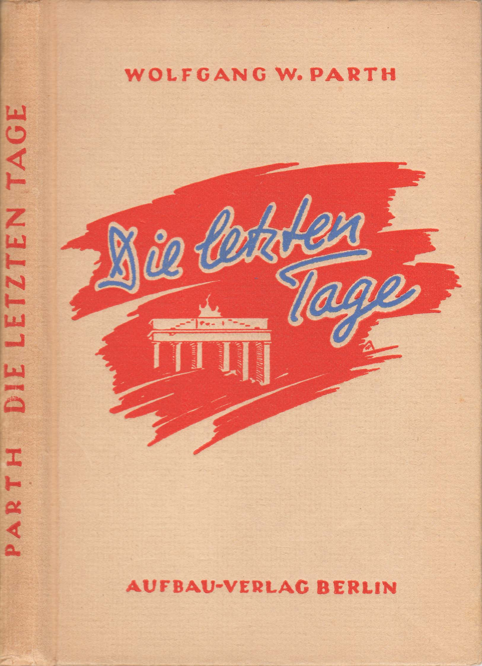 Das Buch „Die letzten Tage“ handelt am Ende des Zweiten Weltkrieges. Es umfasst 72 Seiten (120x185 mm). Die Umschlagzeichnung stammt von Helene Paetznick. Das Buch erschien 1946 vom Aufbau-Verlag GmbH Berlin.